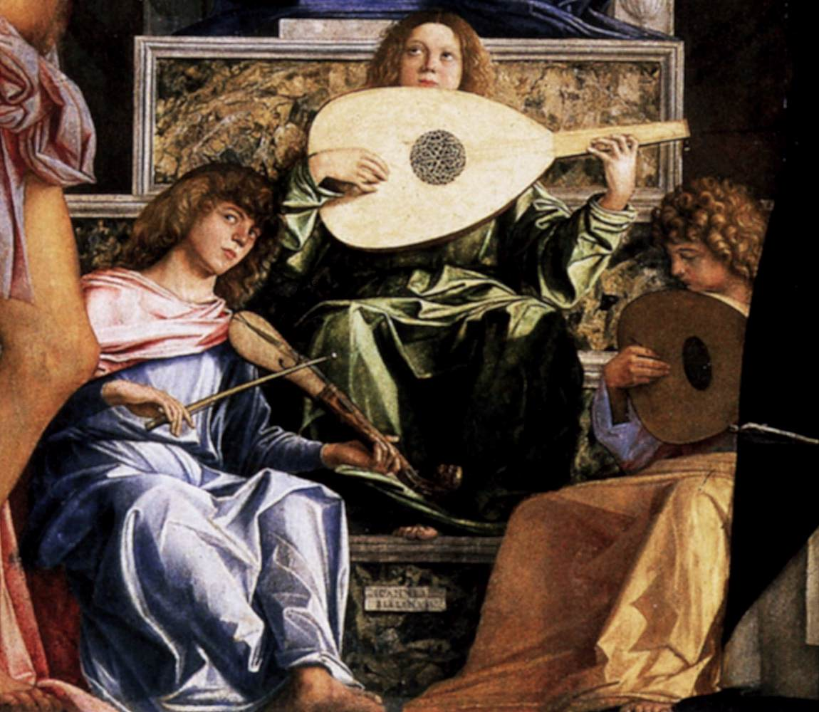 San Giobbe Altarpiece